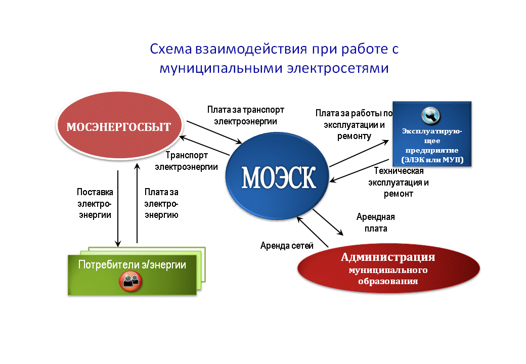 Схема взаимодействия МОЭСК при работе с муниципальными сетями